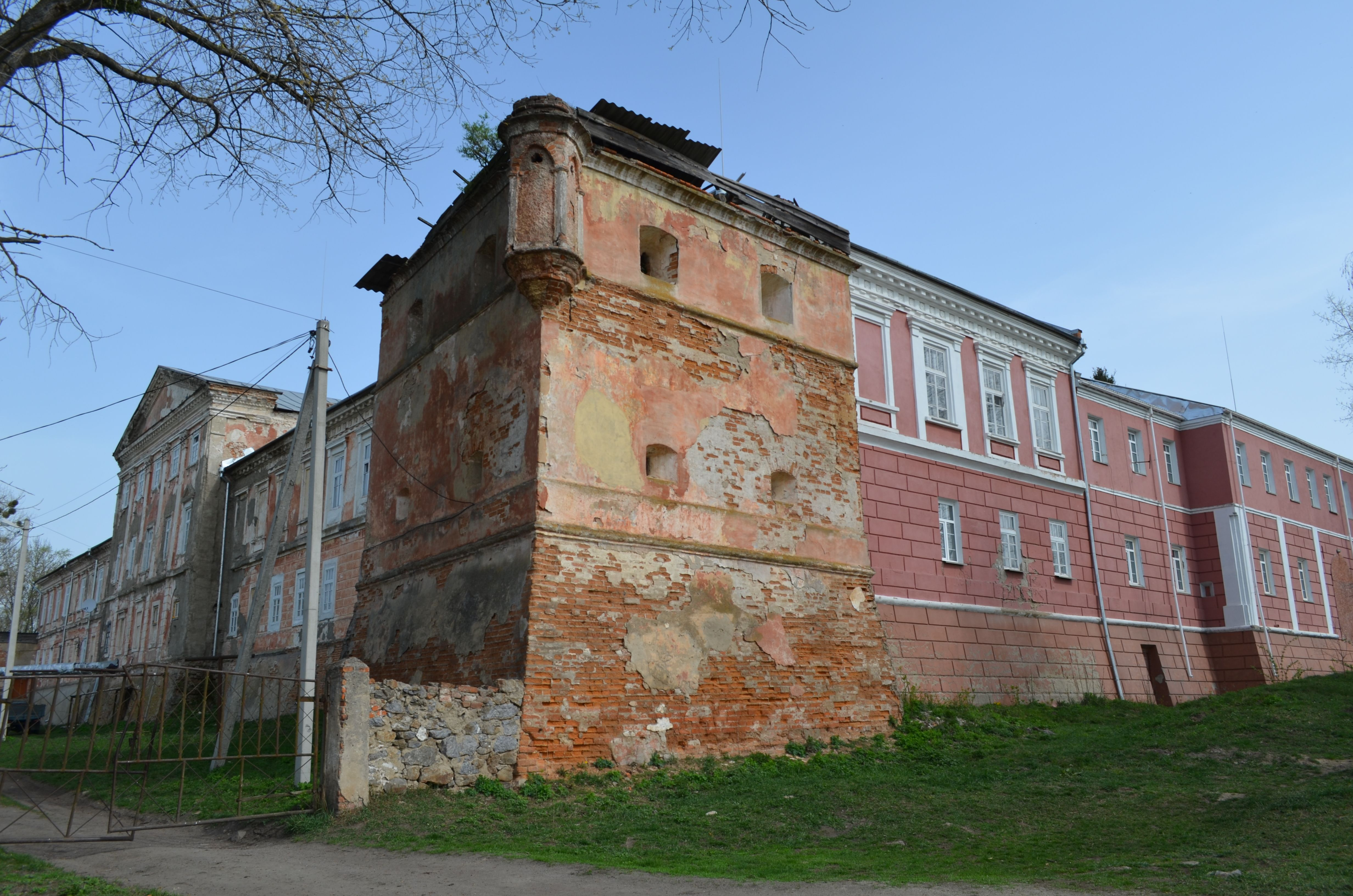 Замок, Іванів, вул. Гагаріна